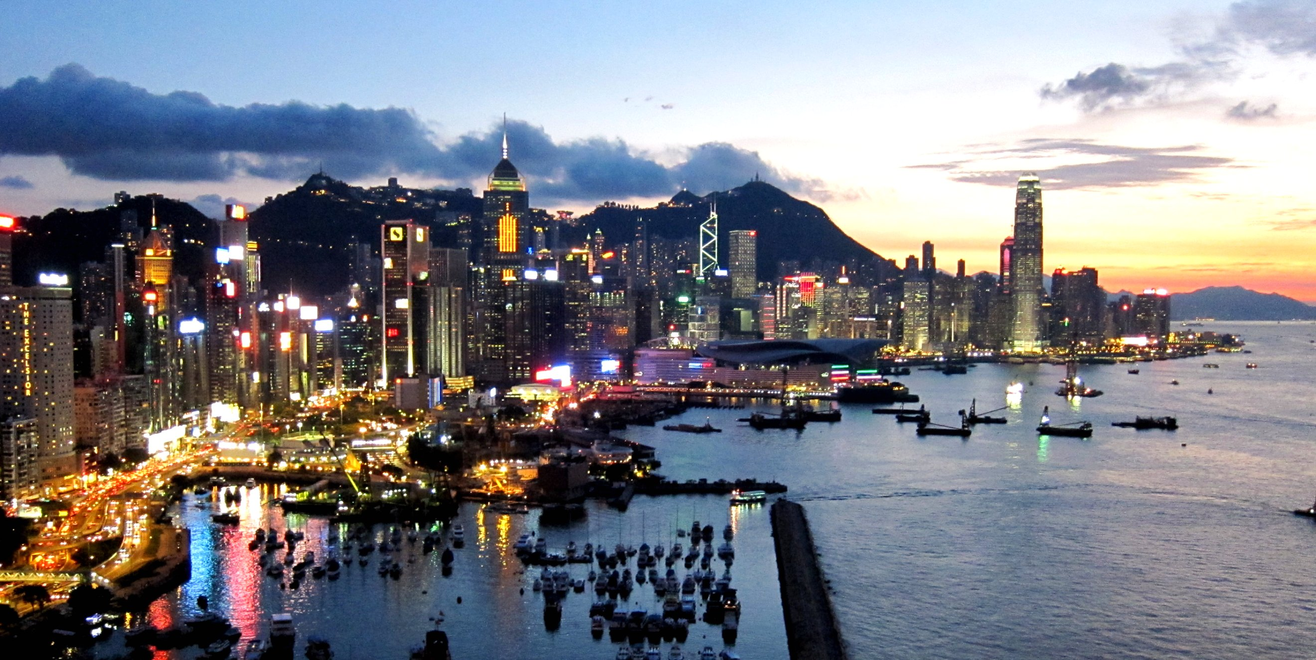 Hong Kong Skyline